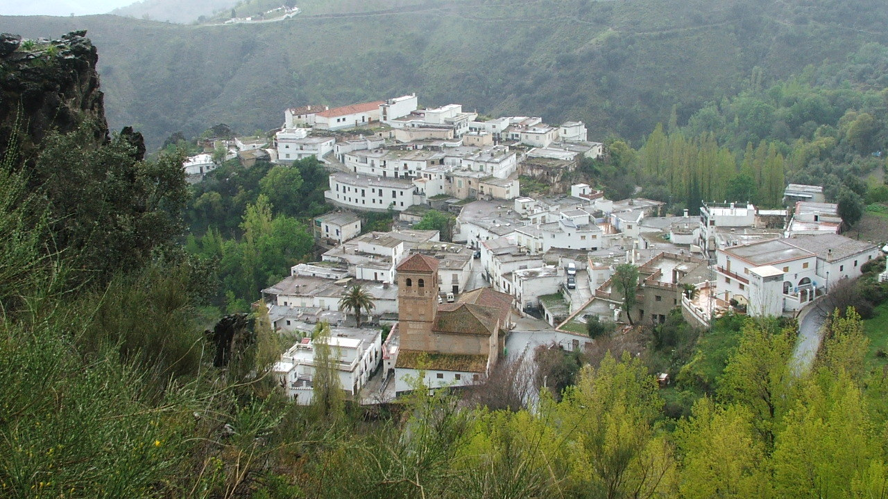 vista de Cástaras